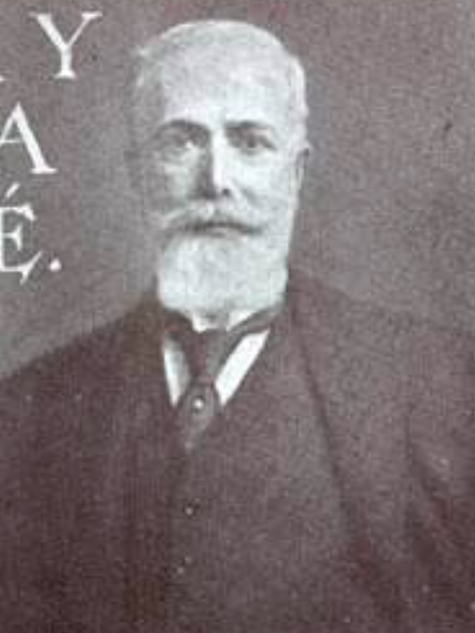 10 de abril de 1902 contrajo matrimonio con Ines Echeverría Bello. Se instalaron en la mansión de los Echeverría Valdés y tuvieron 4 hijas que fueron Luz, Iris, Rebeca e Inés.